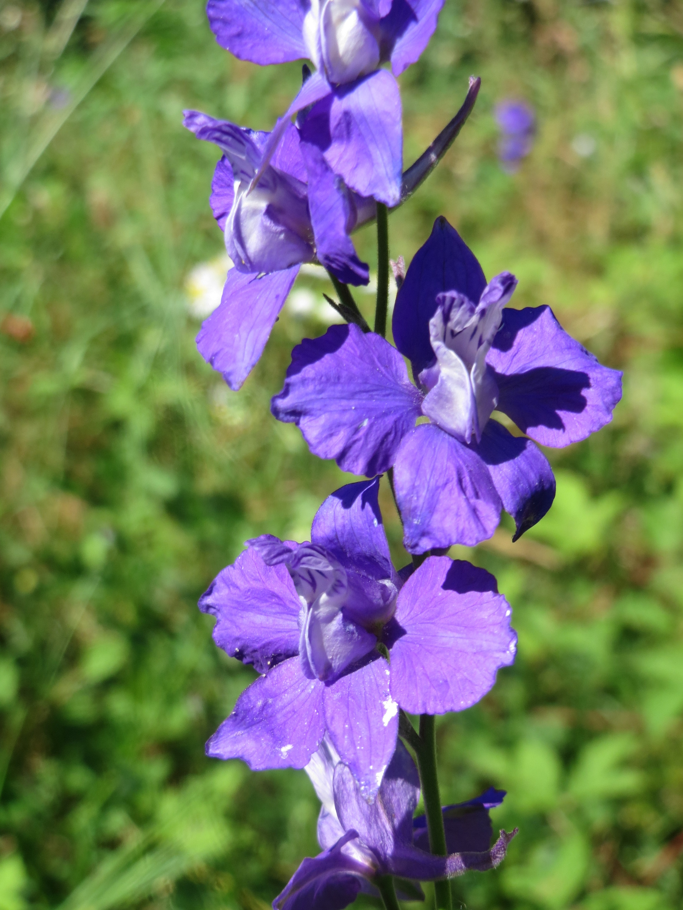 Ausgewilderter Garten-Feldrittersporn (Consolida ajacis) bei Reilingen